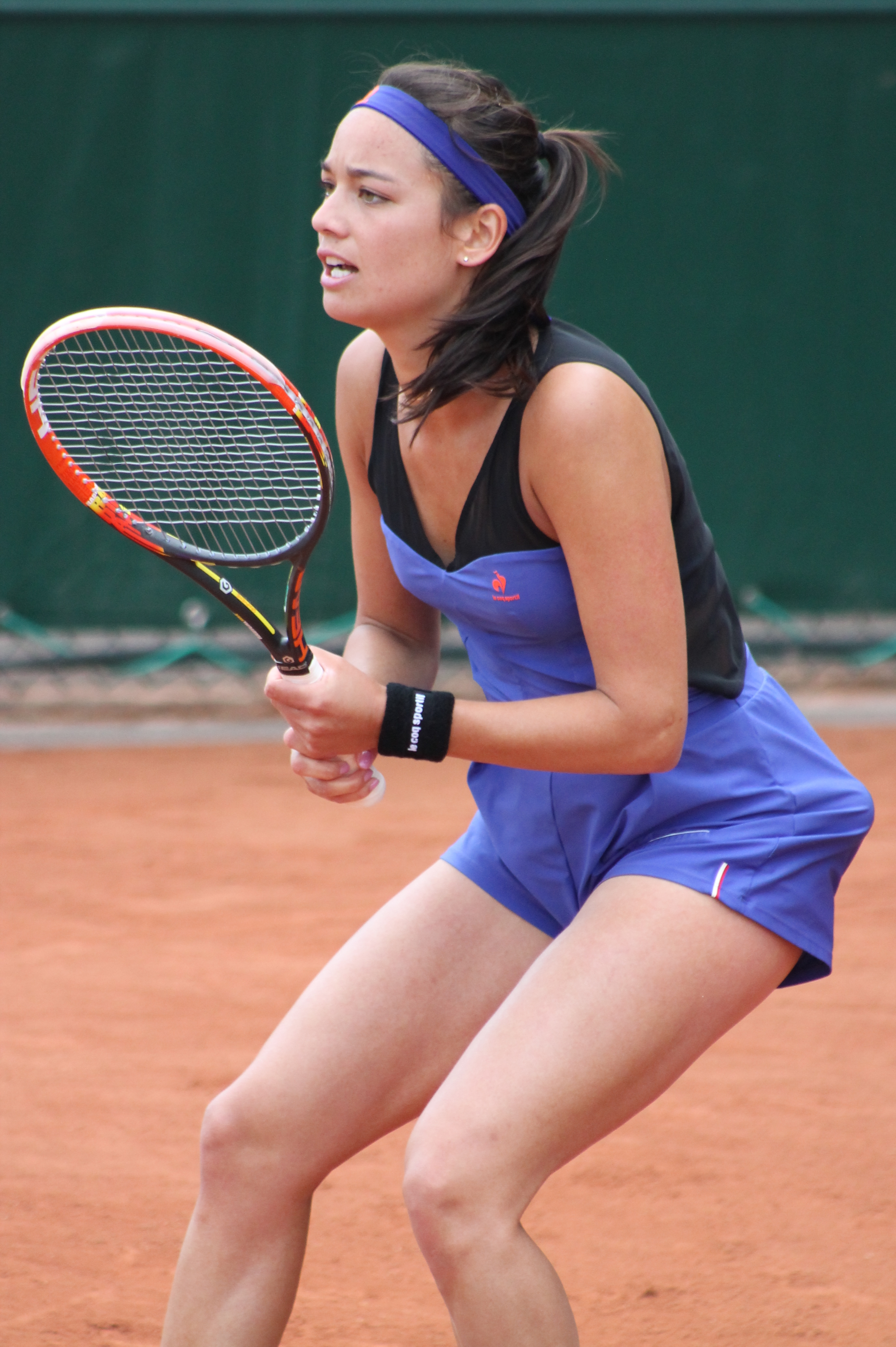 Alizé Lim RG15